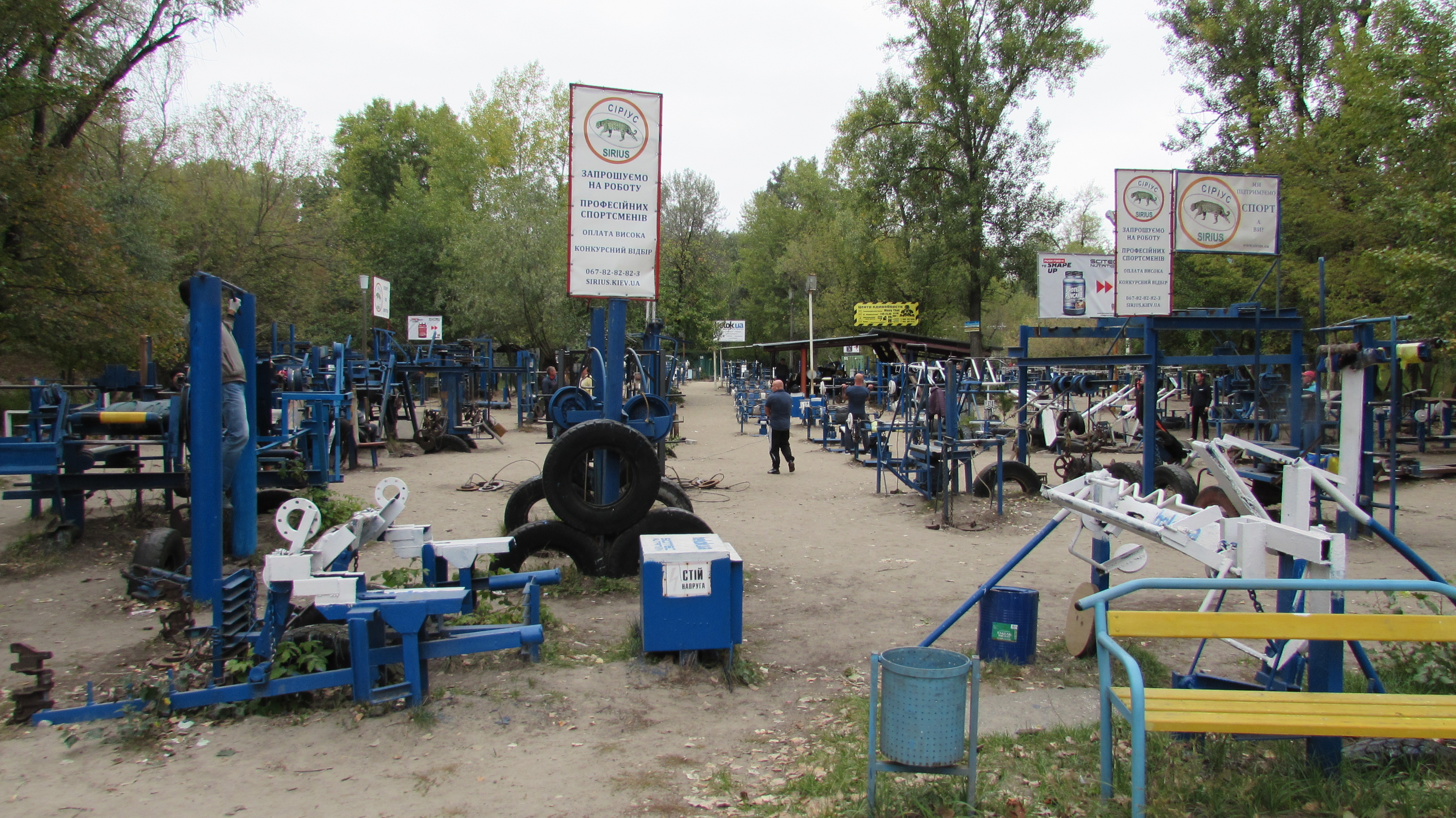 Kiew Hidropark Fitness2